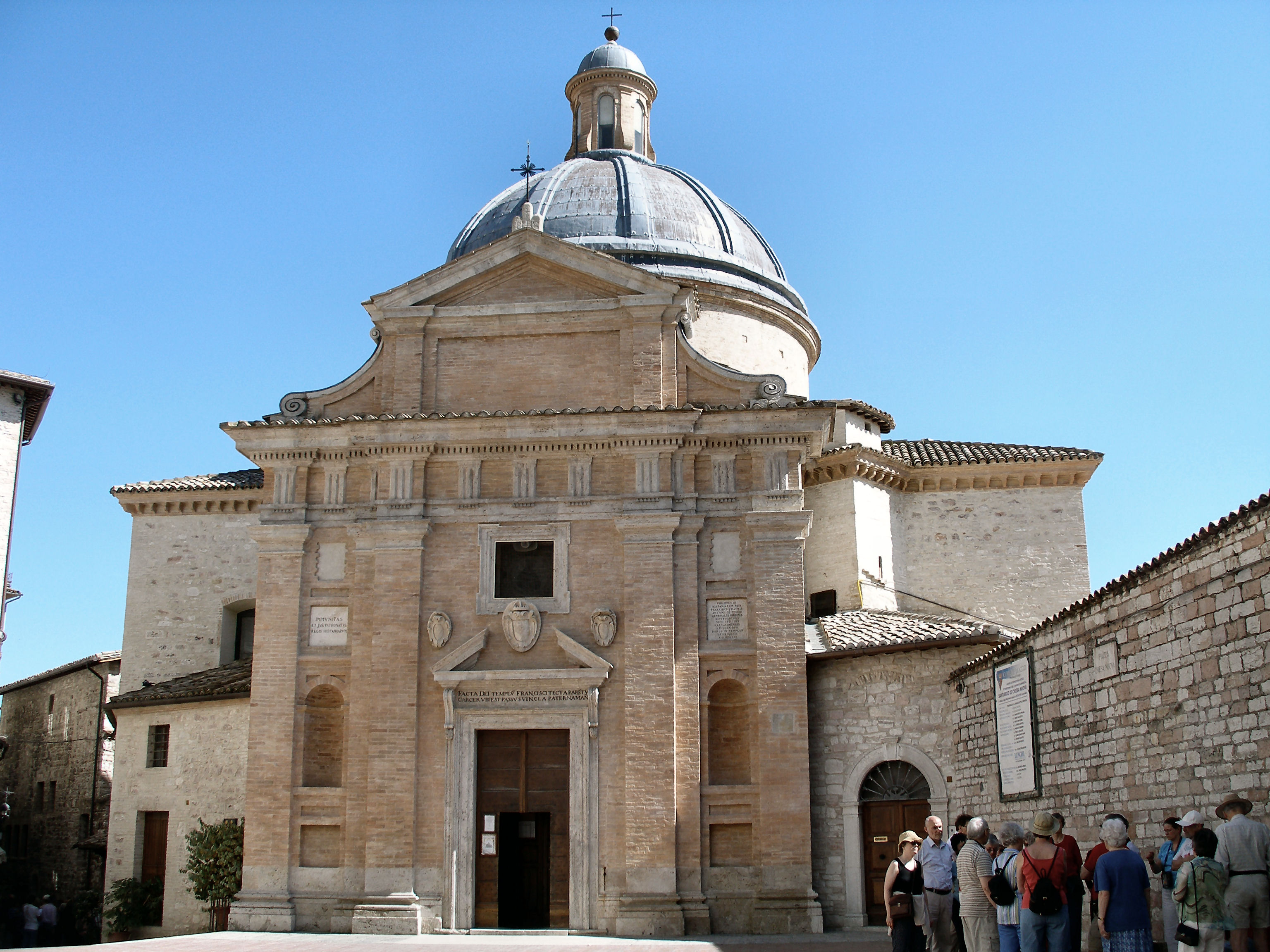 Assisi Chiesa Nuova